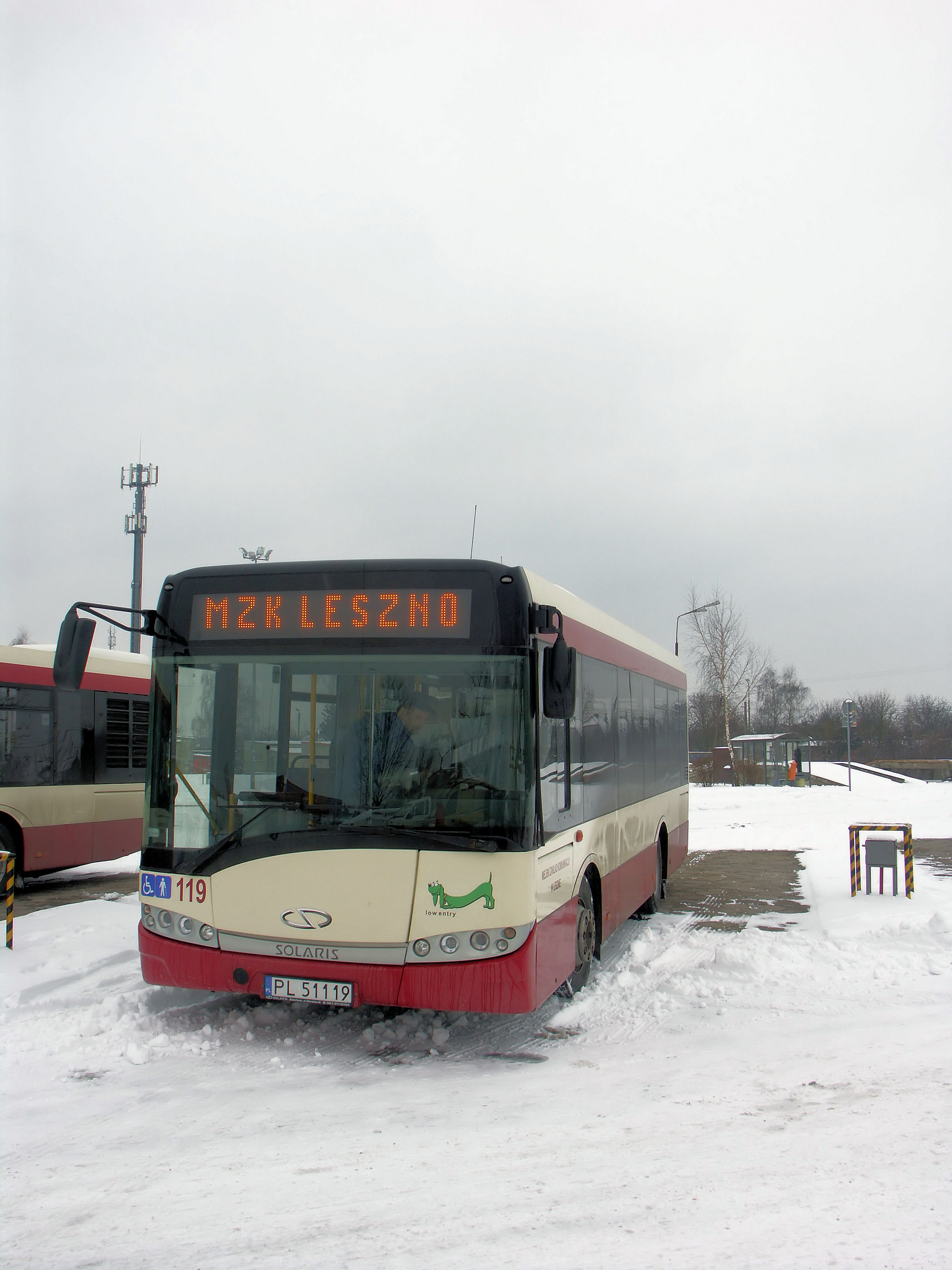 Solaris Alpino 8,9 LE o numerze 119